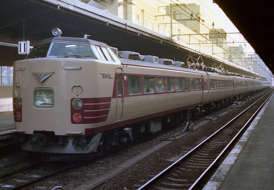 国鉄 485系特急形電車 特急「雷鳥」 クハ481-300番台